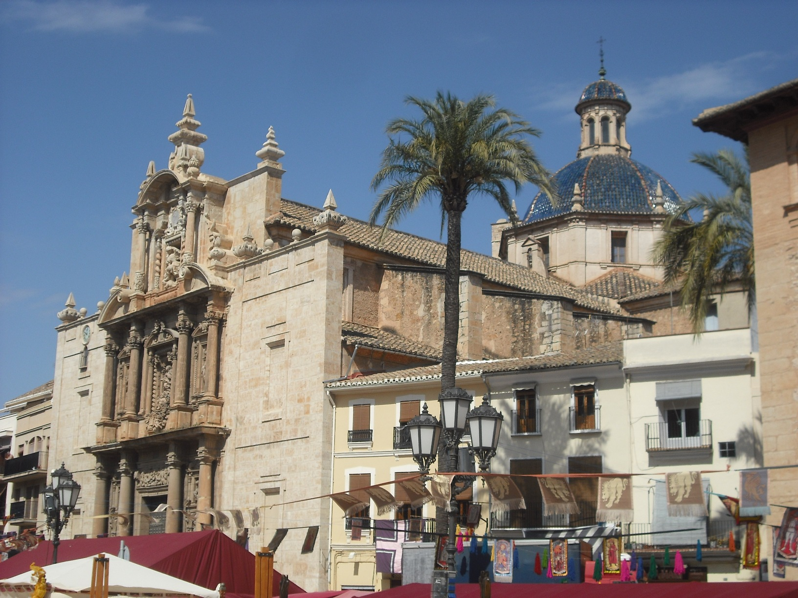 Església de l'Assumpció de Llíria.